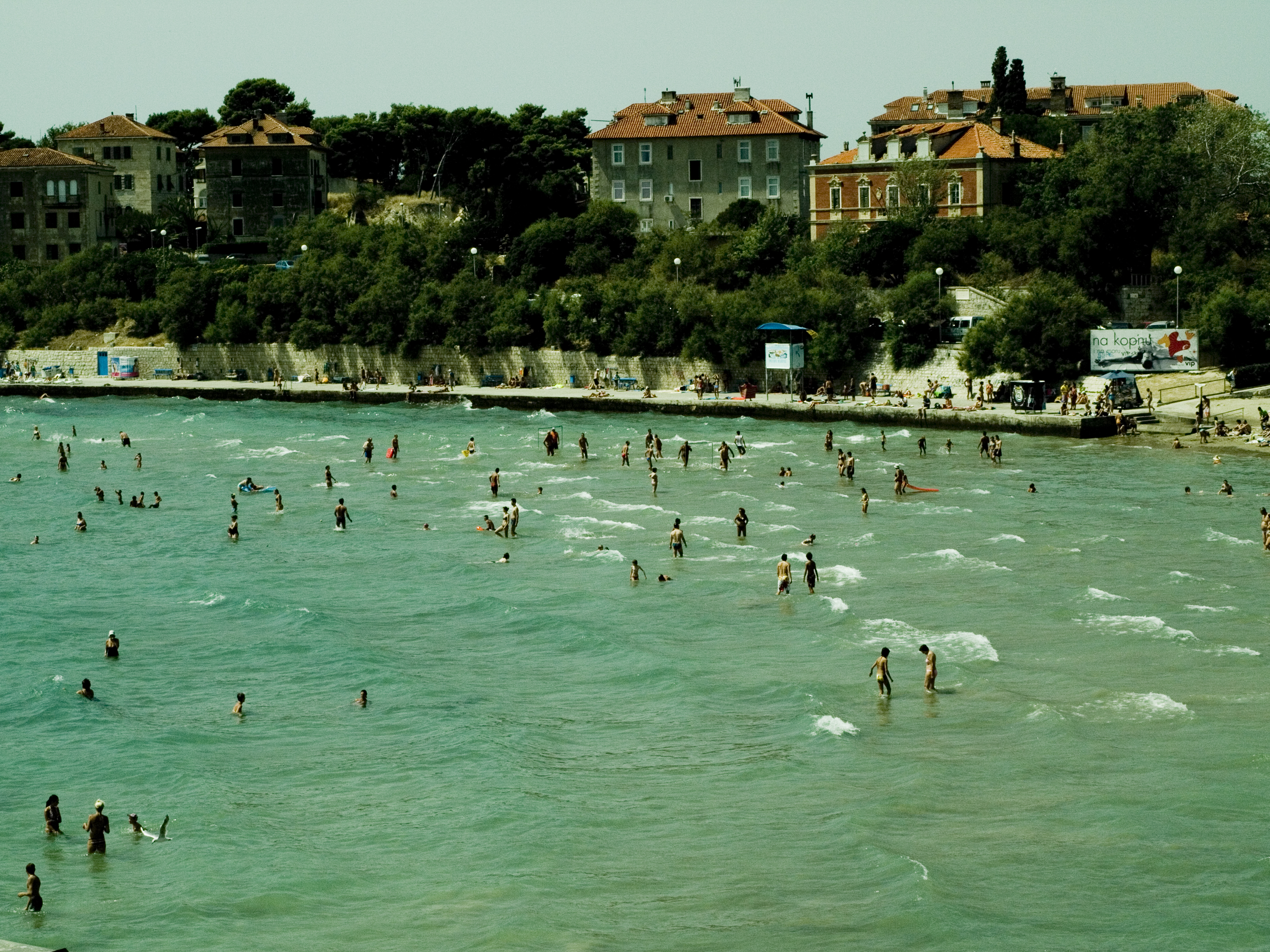 Plaža Bačvice